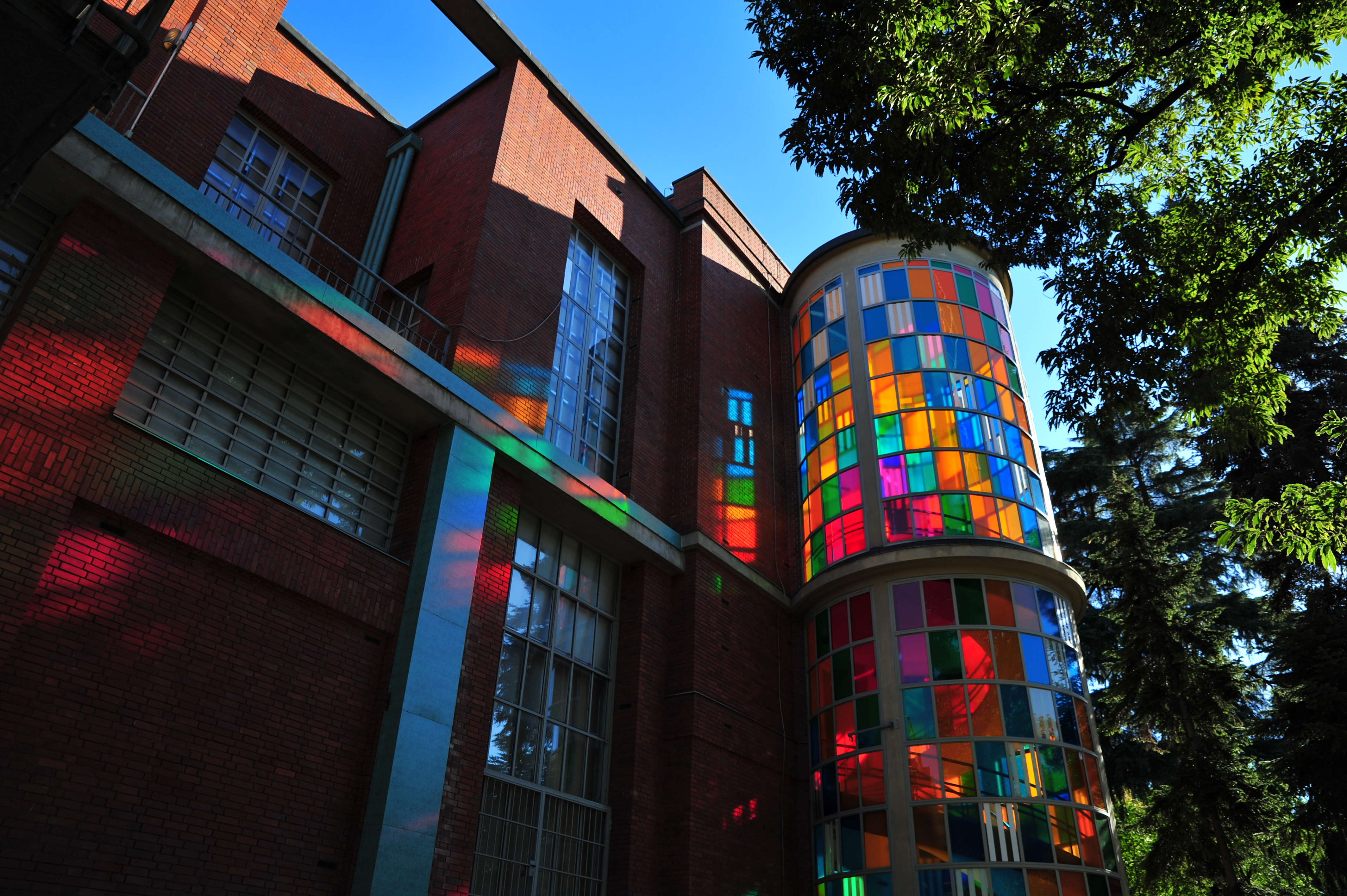 Palazzo dell'Arte This is a photo of a monument which is part of cultural heritage of Italy.